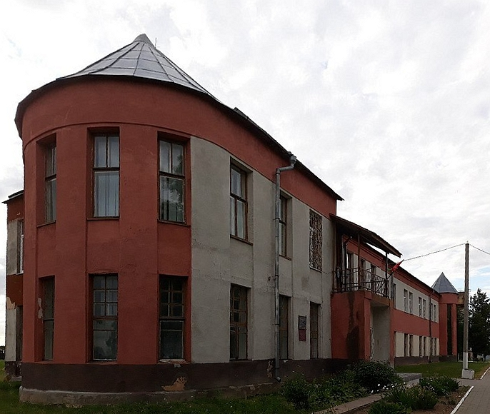 будынак упраўлення каўгасам